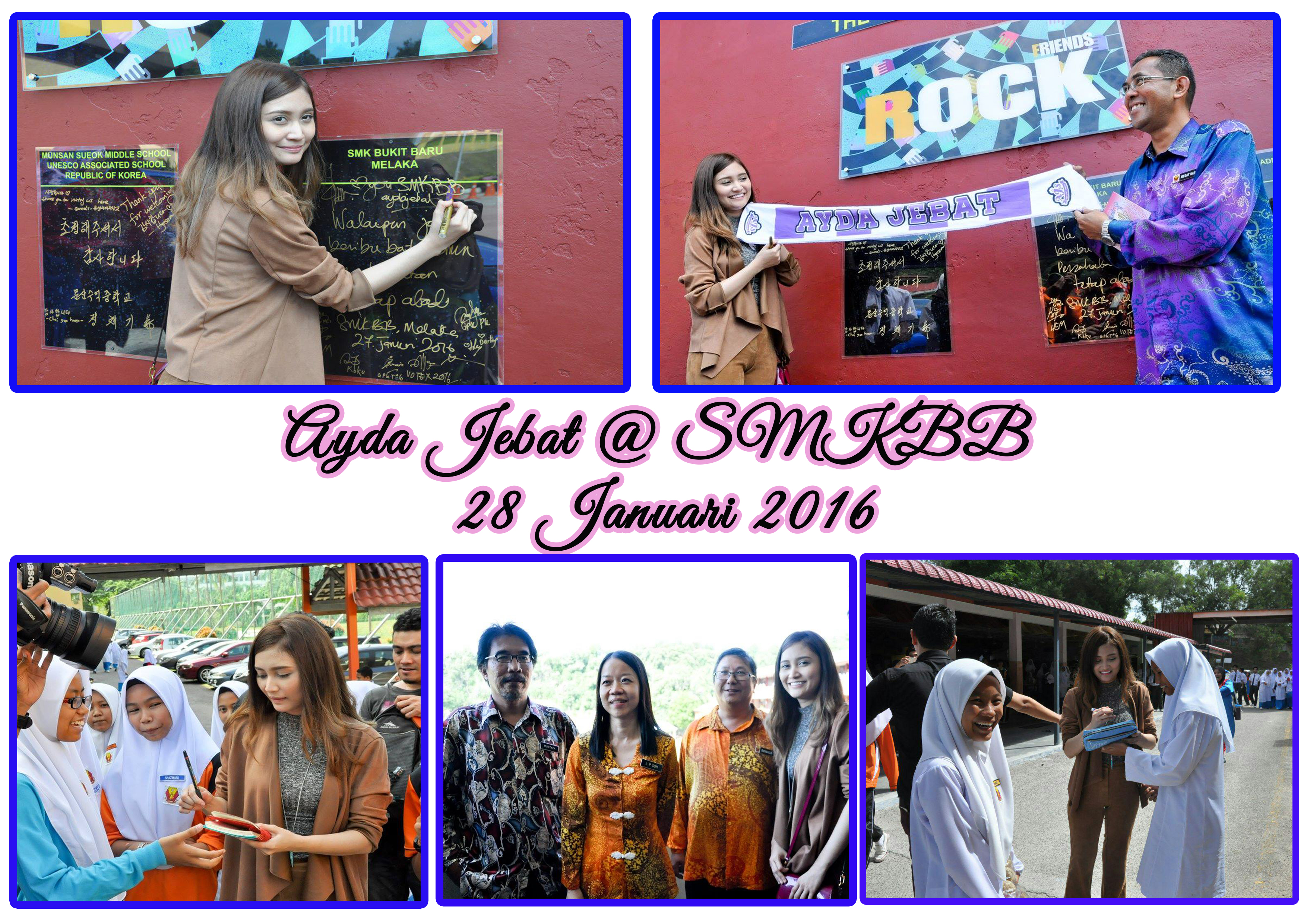 Aida Jebat